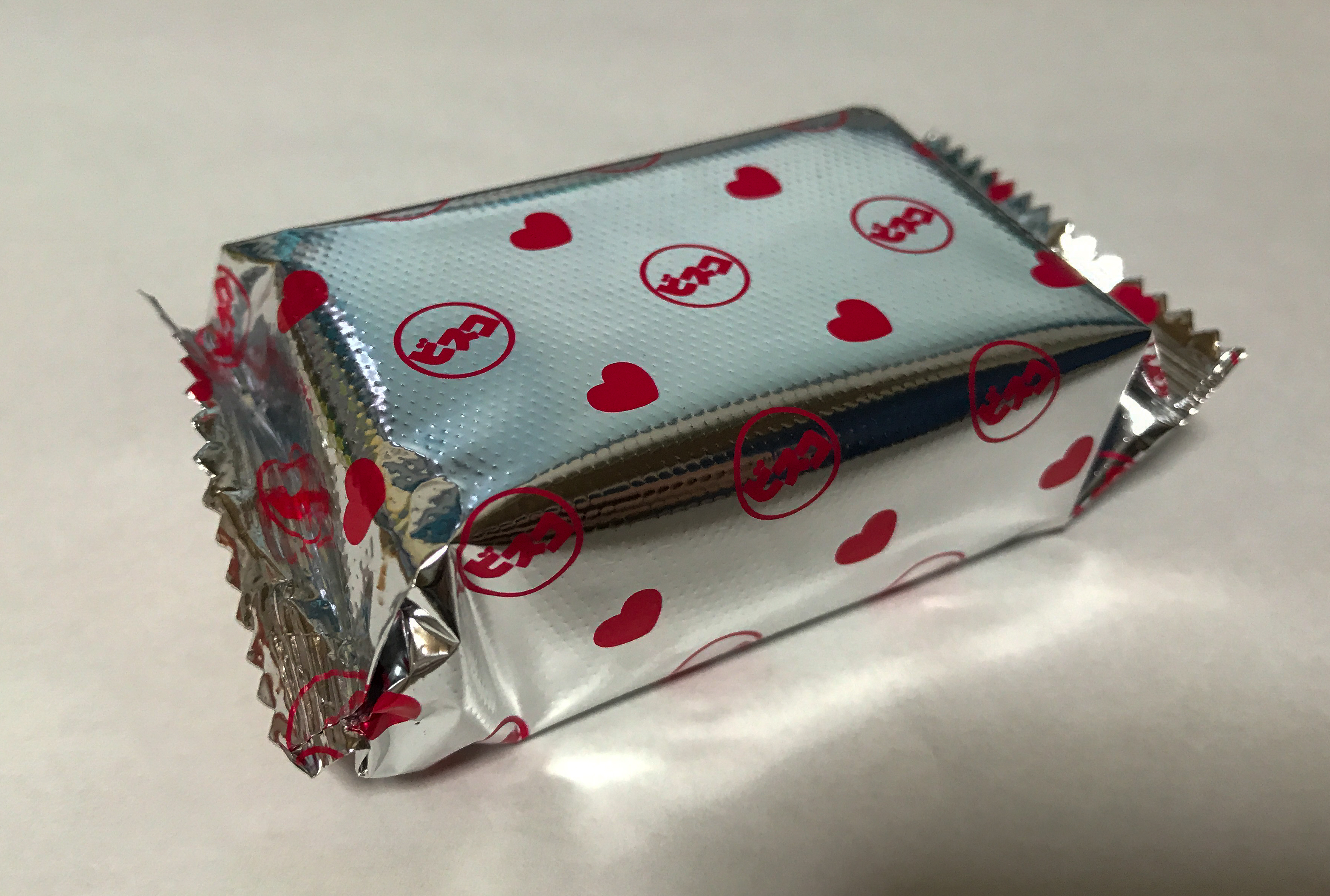 ビスコ 個包装